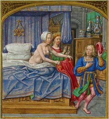 Llit